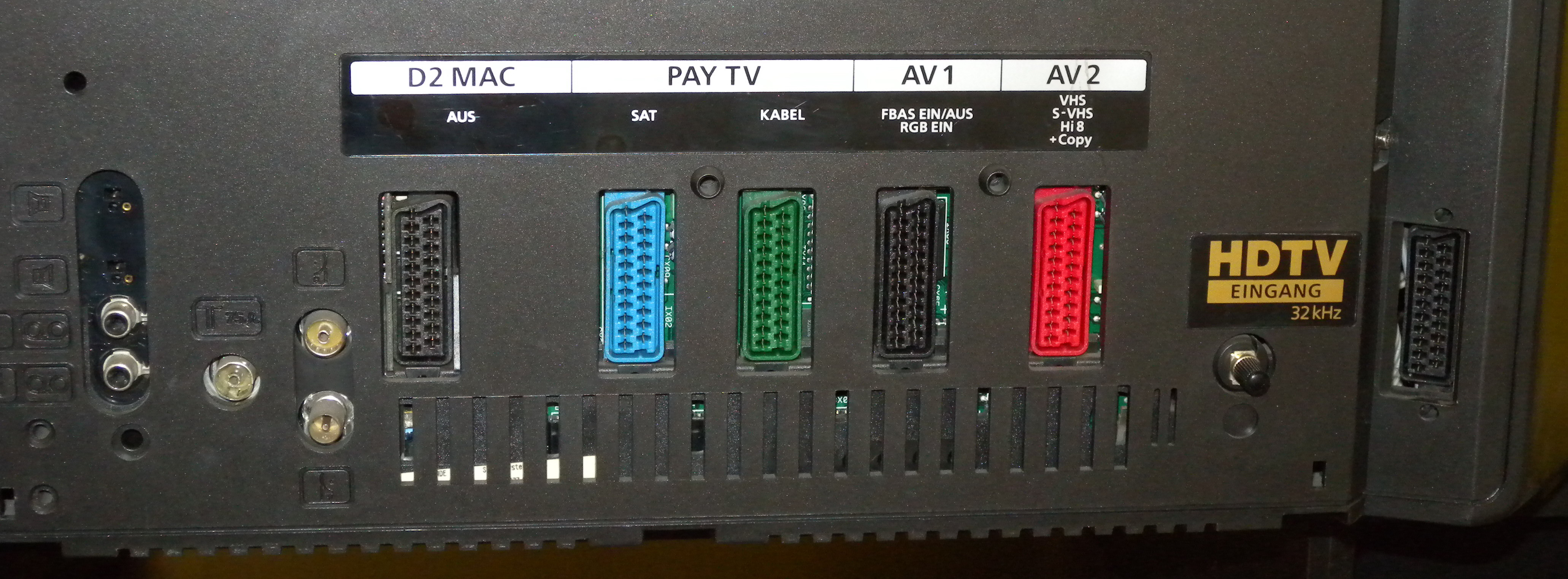 Anschlüsse eines Nordmende Space System 92 HS Fernsehgerätes mit HD-MAC-Standard.